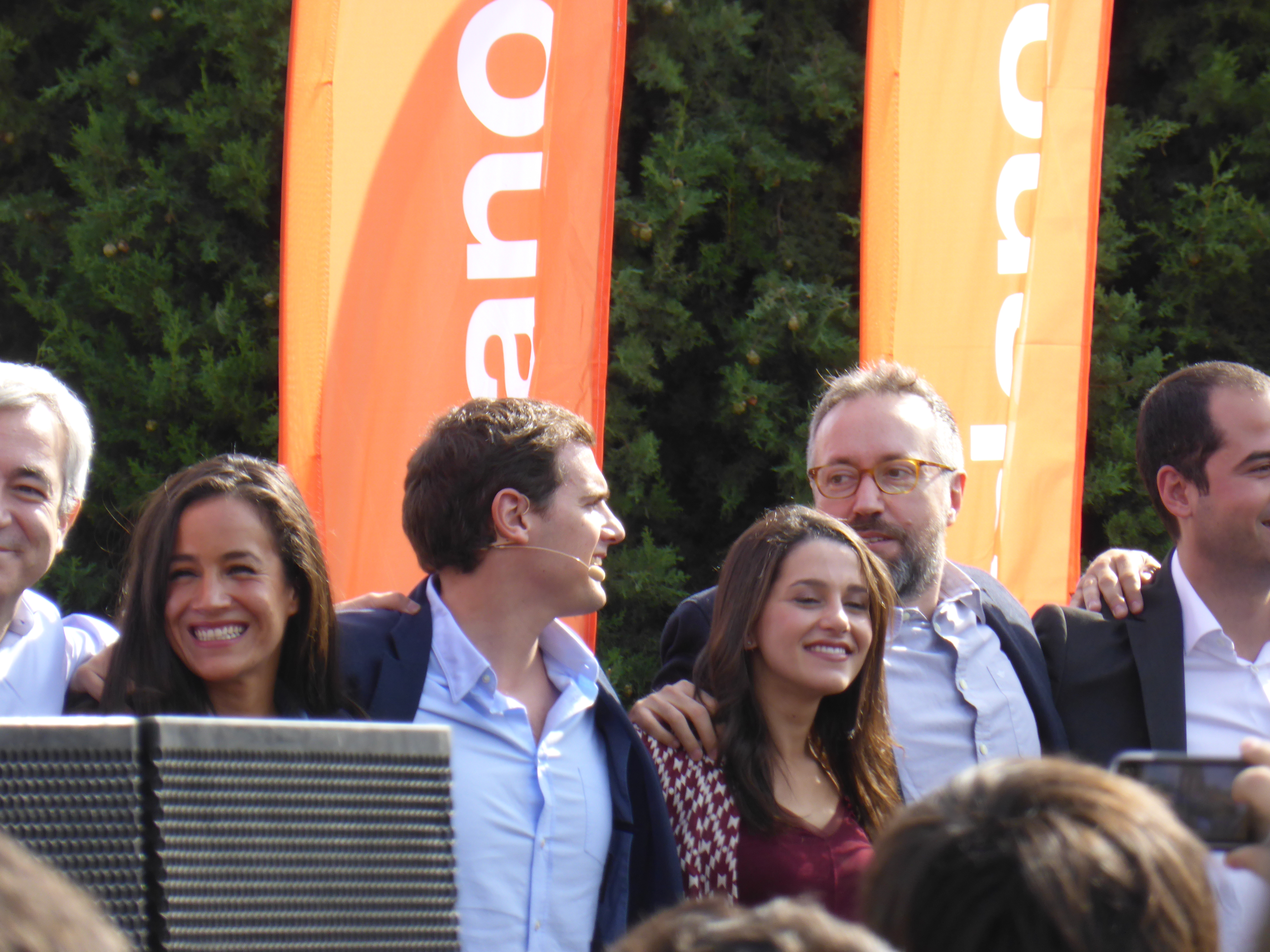 En la explanada del Templo de Debod, en Madrid, durante un acto preelectoral (antes de las elecciones generales), están presentes algunos de los más destacados dirigentes del partido político español "Ciudadanos". En el centro, Albert Rivera e Inés Arrimadas. 25 de octubre de 2015.